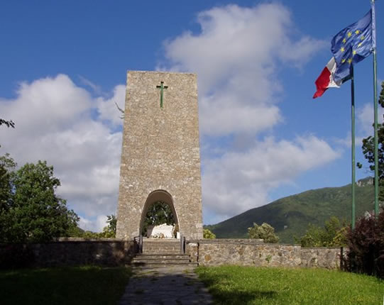 Autore Francesco Mulas, 26 giugno 2007, Sant'Anna di Stazzema (LU), Monumento ossario che ricorda l'eccidio del 12 agosto 1944. Licenza d'uso GFDL.